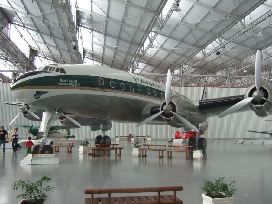 Constellation L-049 ano 1946 em exposição no museu Asas de um Sonho, São Carlos - SP. Eu acho esse avião, mais o Jumbo 747, os mais bonitos aviões comerciais já fabricados. Vemos em placa próxima: "É considerado a majestade dos ares e o pioneiro dos grandes vôos transoceânicos sem escalas. Considerado um dos mais belos aviões comerciais do mundo. Revolucionou a aviação comercial brasileira pelos avanços tecnológicos da época. A Panair do Brasil foi o seu maior operador no Brasil e por isso decidimos homenageá-la com a sua pintura. O Constellation L-049 do acervo foi fabricado em 1946 e pertenceu primeiramente à KLM. Entre 1961 e 1965 passou por alguns operadores e naquele ano, as autoridades paraguaias o prenderam em Assunção com um carregamento ilegal. Nunca mais ele voou e a partir de 1978 o velho 'Connie', como era conhecido, deixou de receber qualquer cuidado de preservação, começando a deteriorar-se rapidamente. Em 1999, depois de 34 anos de abandono, a Eductam adquiriu o que dele restou e o trouxe para o Brasil em seis carretas, promovendo o seu restauro apenas para exposição estática, porque ele jamais poderá voar."